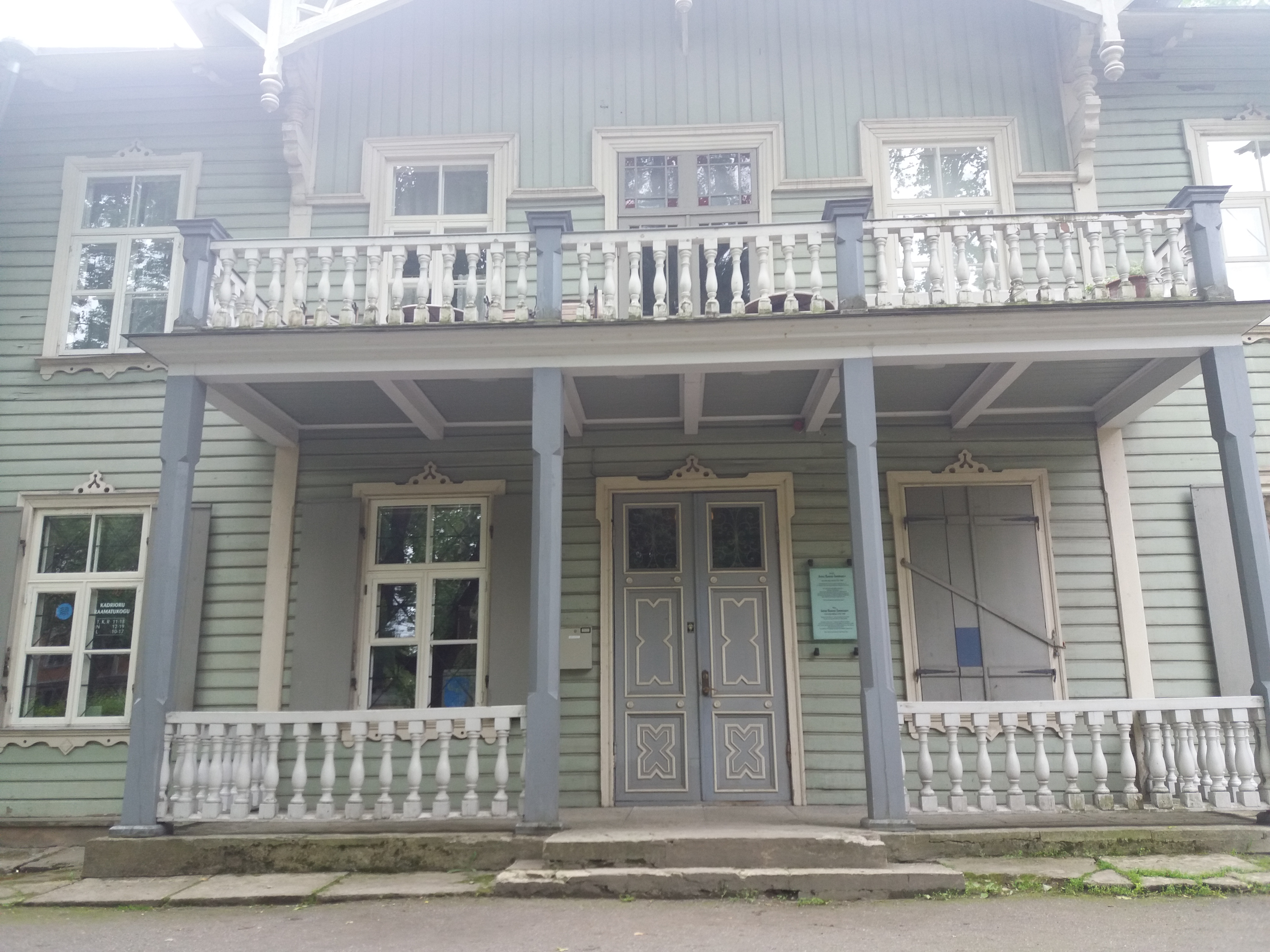 Kuvassa A.H. Tammsaaren museon pääsisäänkäynti Tallinnassa, Kadriorgissa.